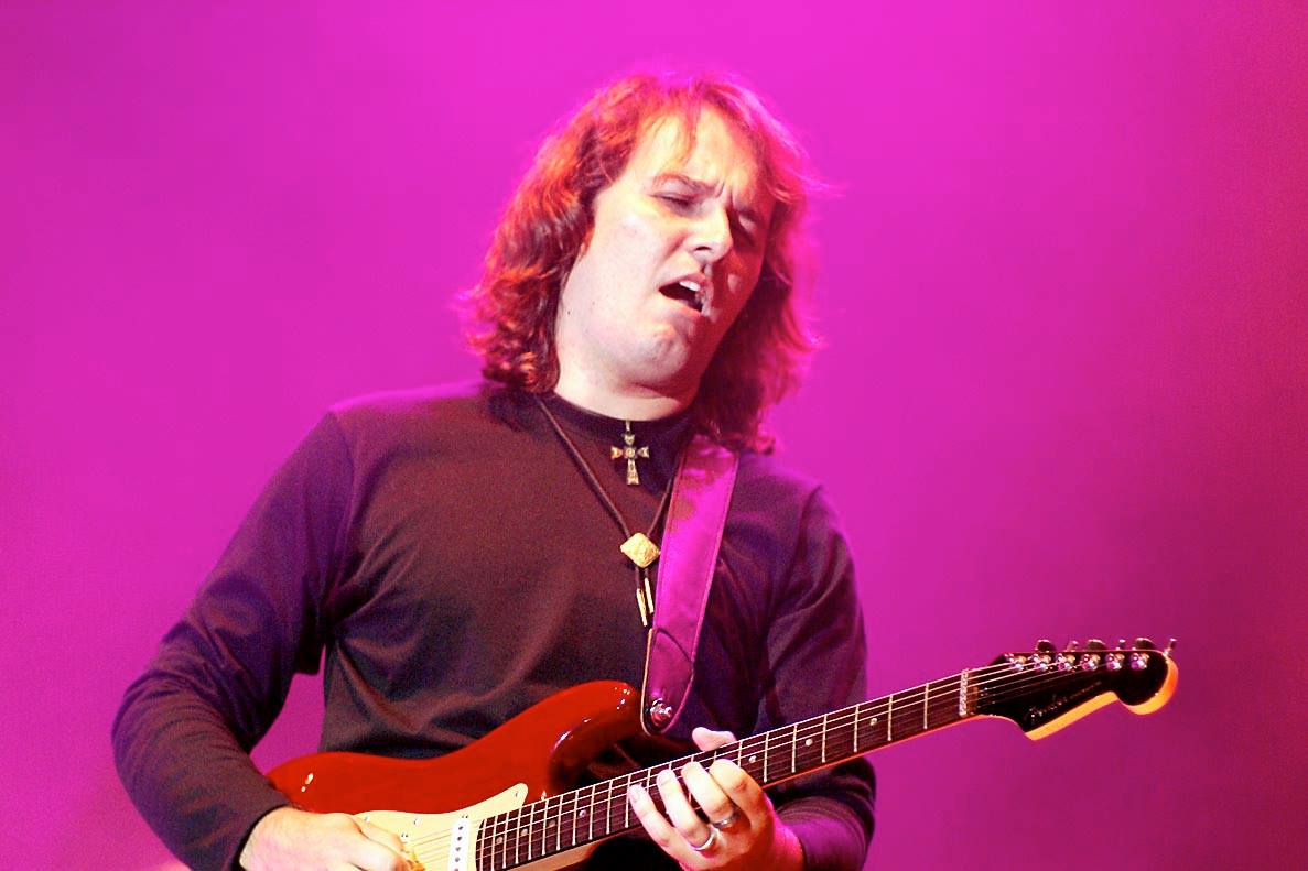 Pablo Mendoza en concierto en el año 2012